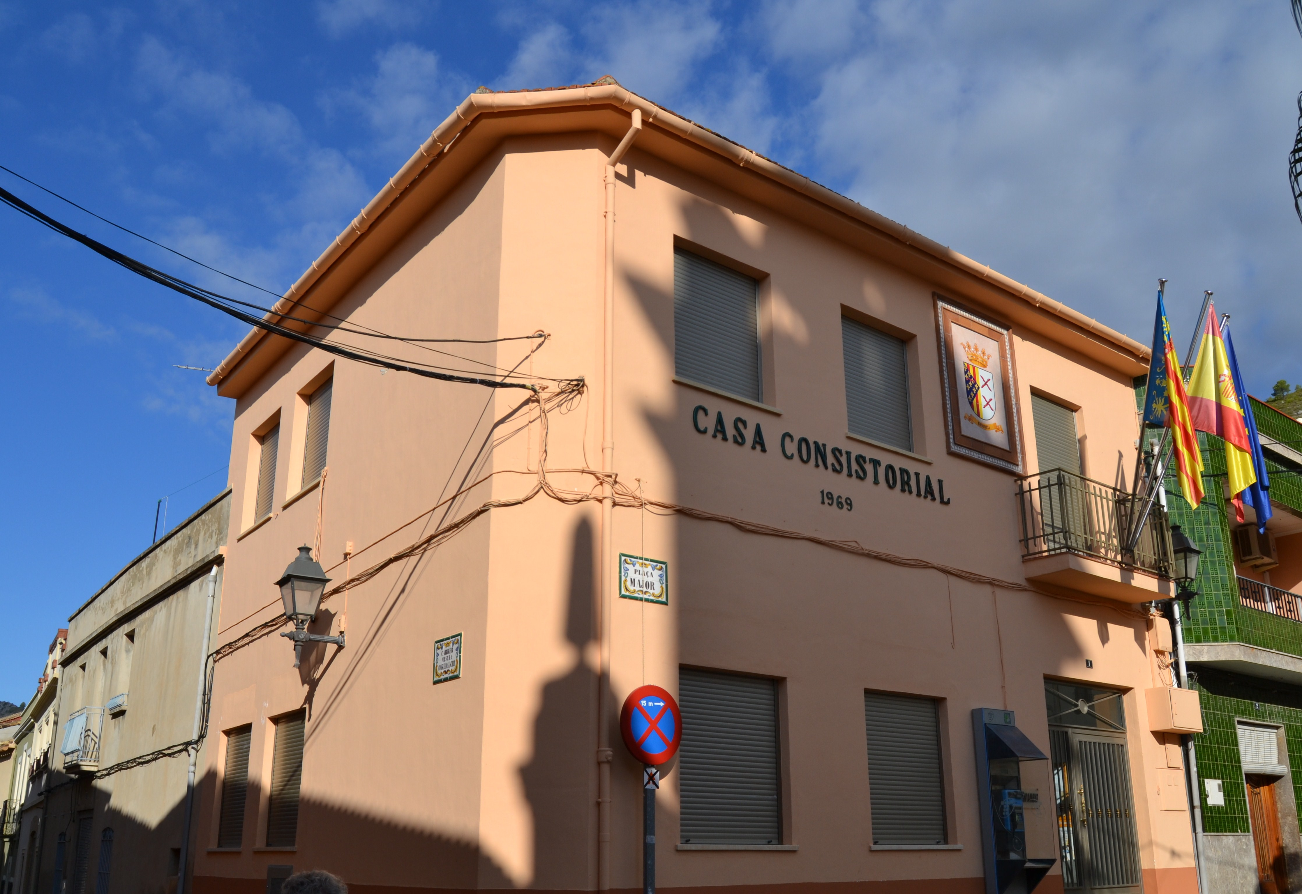 Ajuntament de Benimeli.